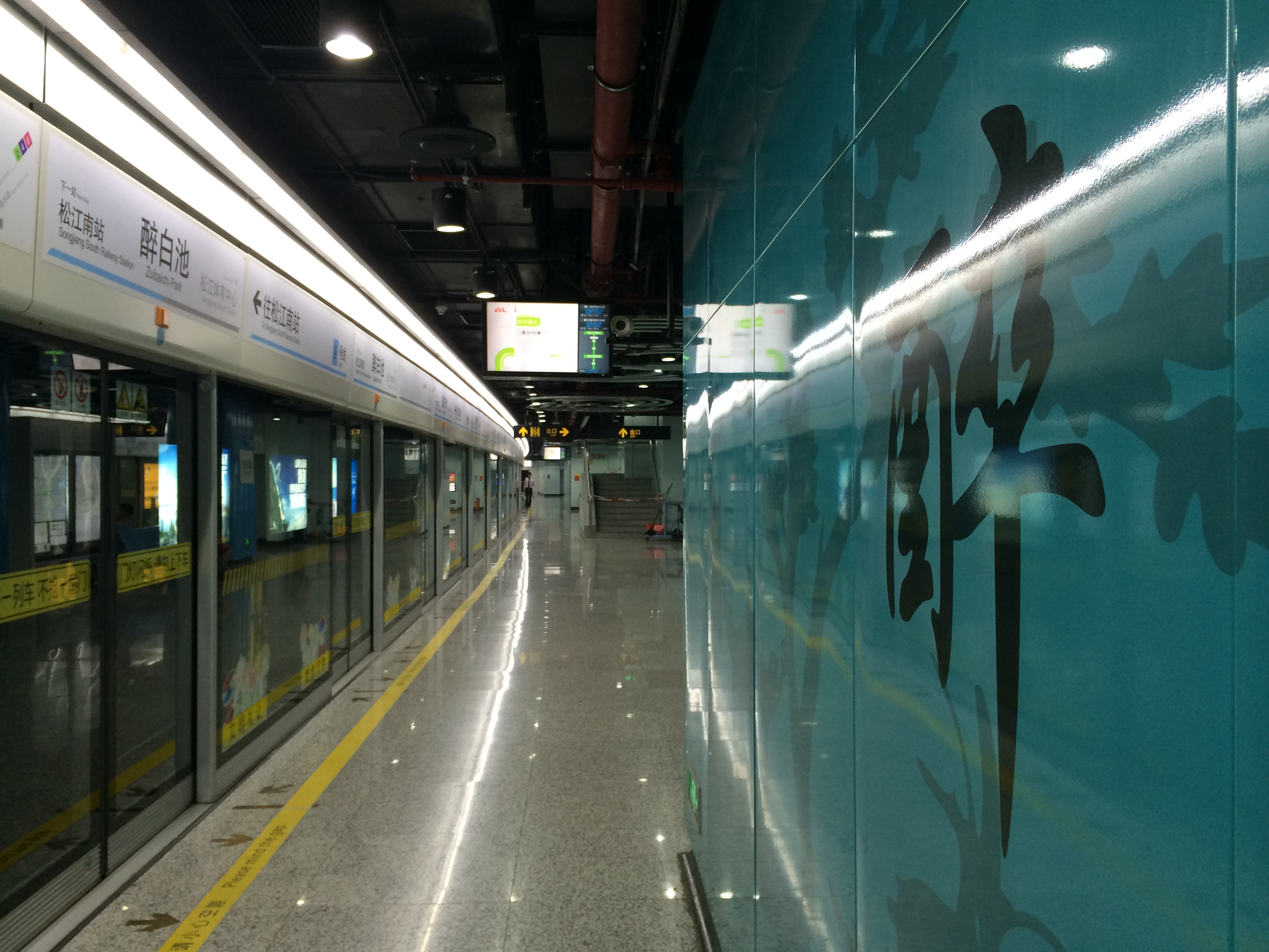 上海地铁9号线醉白池站